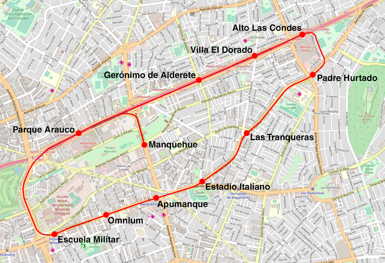 Mapa del trazado del proyecto de monorriel para Las Condes presentado en 1993 This map may be incomplete, and may contain errors. Don't rely solely on it for navigation.